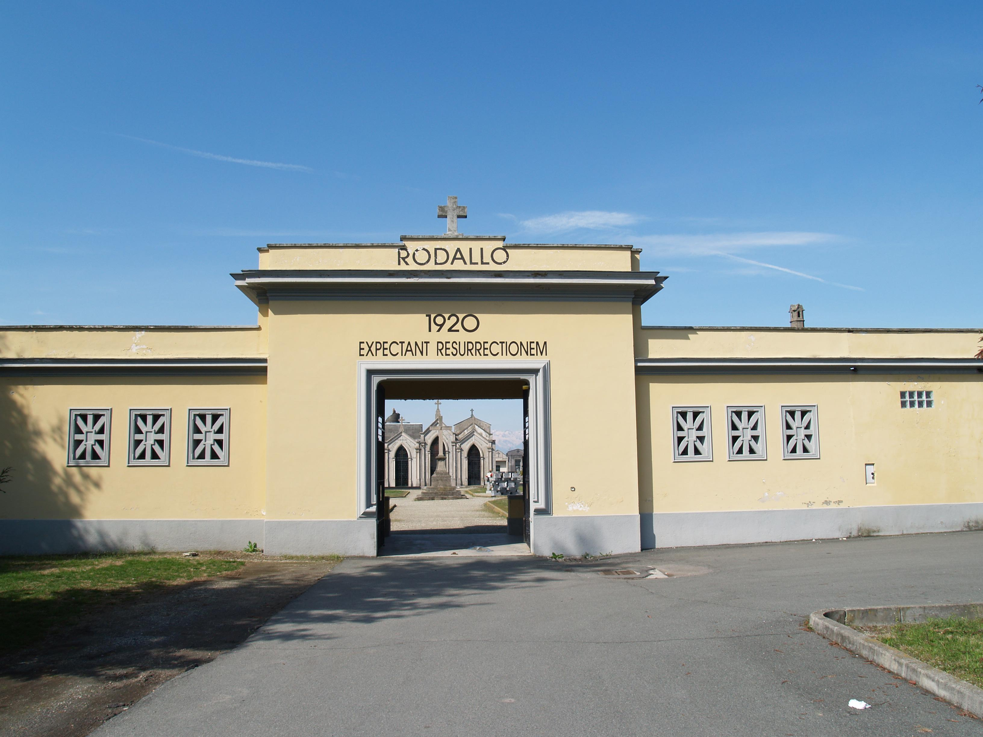 Campo Santo Rodallo